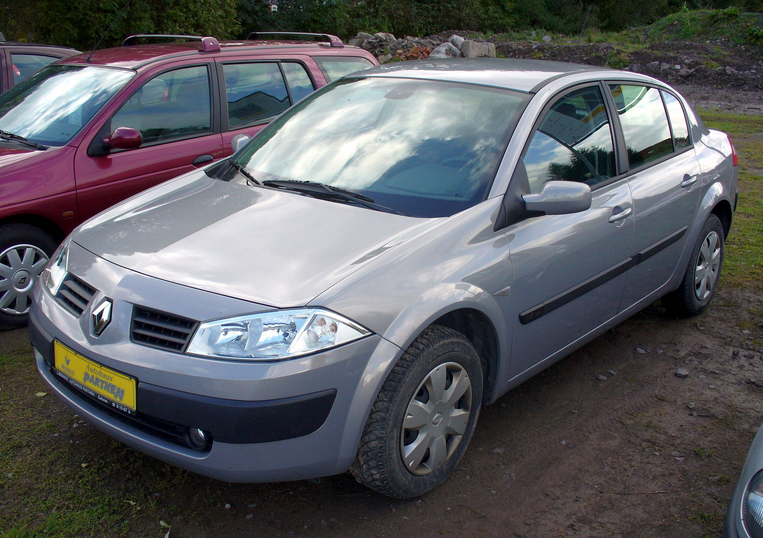 Renault Mégane sedan